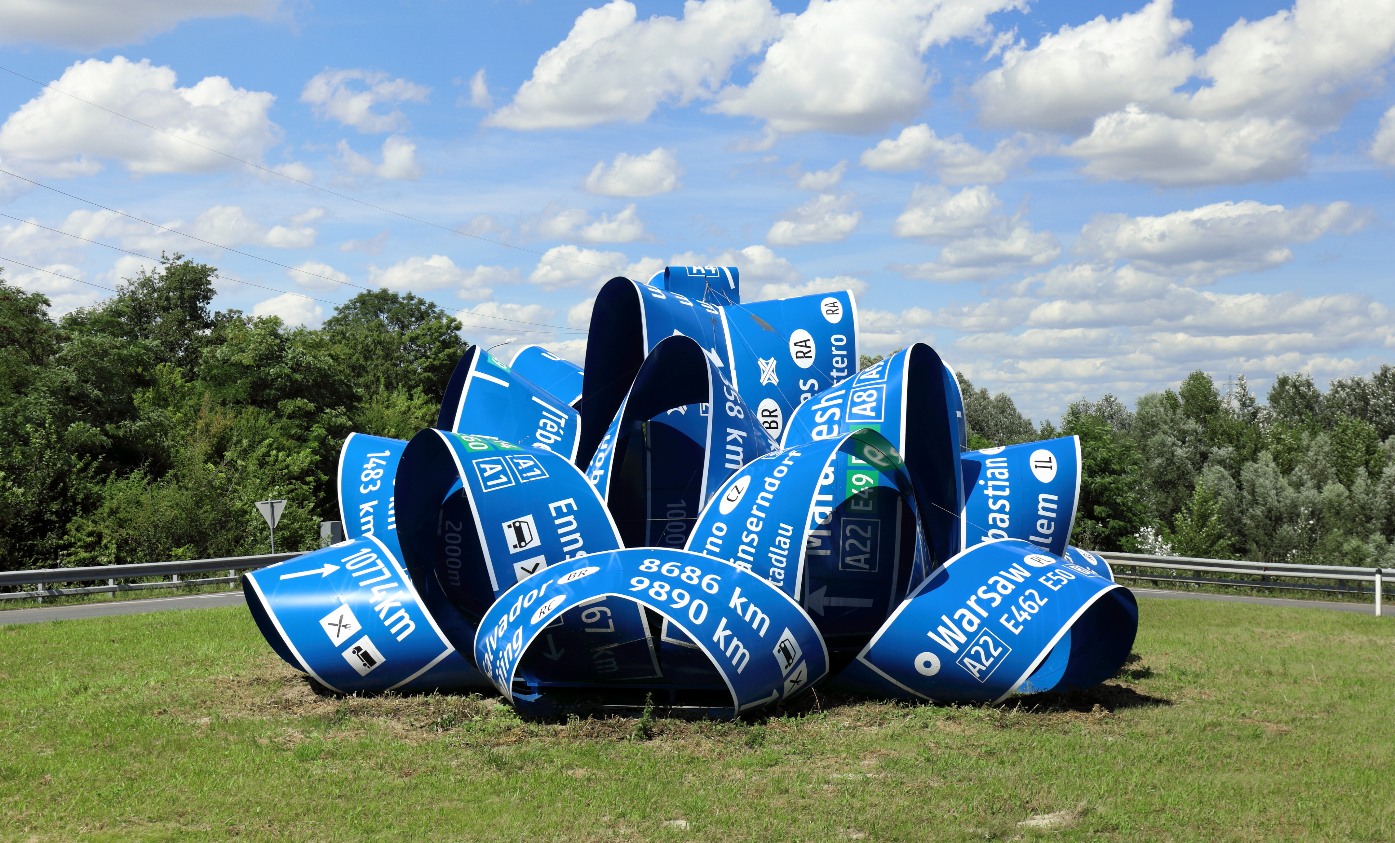 Das Kunstwerk „Here After Here After Here“ vom indischen Künstler Jitish Kallat (* 1974) beim Kreisverkehr bei der Autobahnabfahrt „Stockerau Ost“ in der niederösterreichischen Stadtgemeinde Stockerau.Das Kunstwerk wurde von der Initiative „10 vor Wien“ in Zusammenarbeit mit Kunst im öffentlichen Raum in Auftrag gegeben. Die Installation zeigt eine riesige Endlosschleife mit den für Autobahnen typischen Hinweisschildern und wurde am 11. Oktober 2015 feierlich enthüllt.